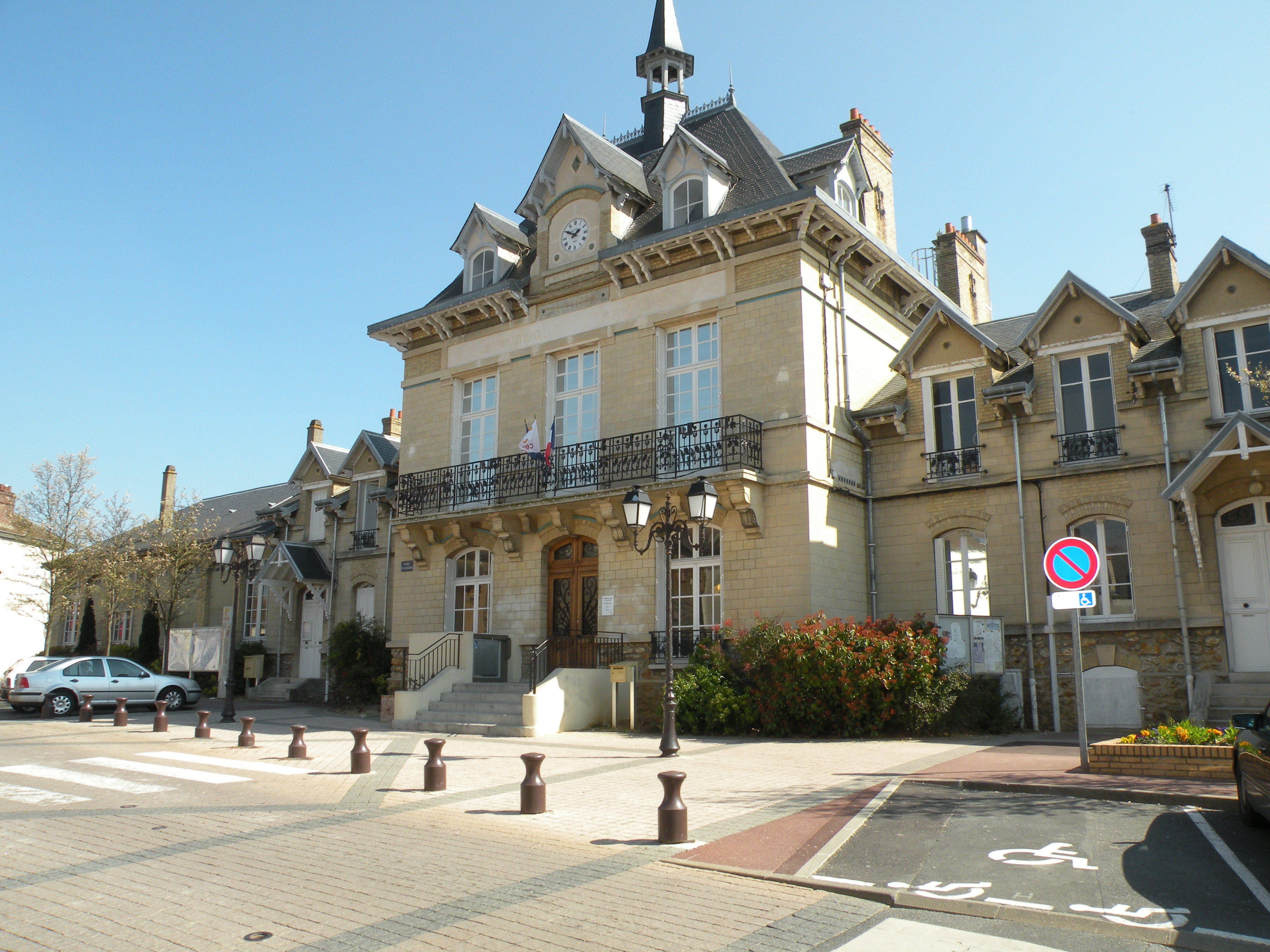 mairie de cergy villages, val d'oise france